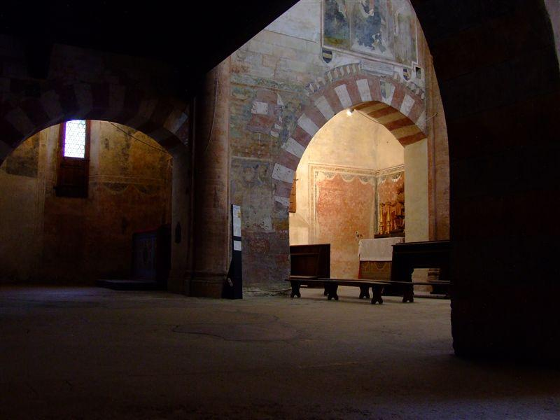 Abbazia di Sant'Antonio di Ranverso, Piemonte, Italia